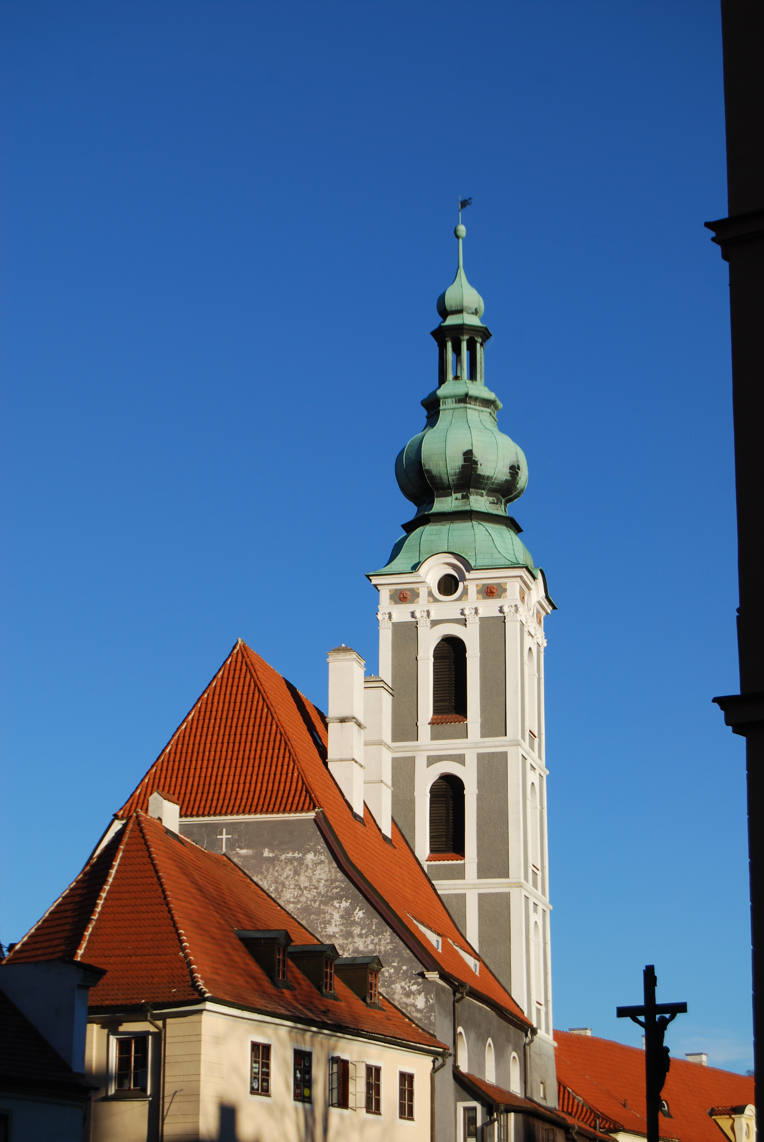 Český Krumlov. Okres Český Krumlov. Česko.